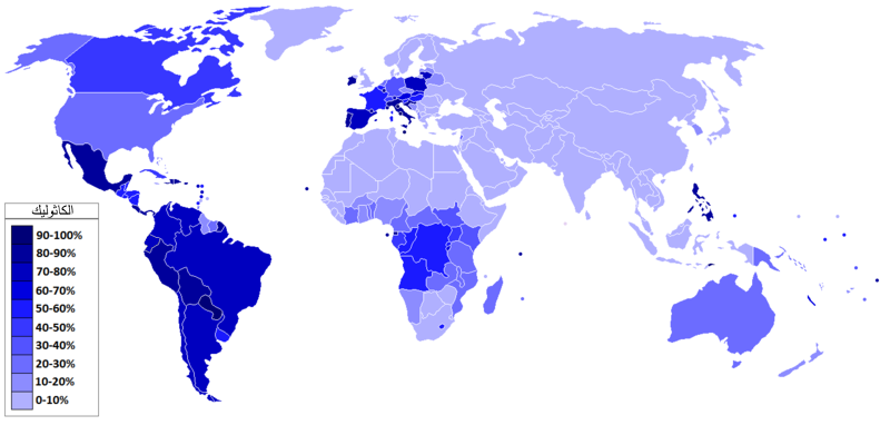 النسبة المئويَّة للمسيحيّن الكاثوليك في بُلدان العالم.